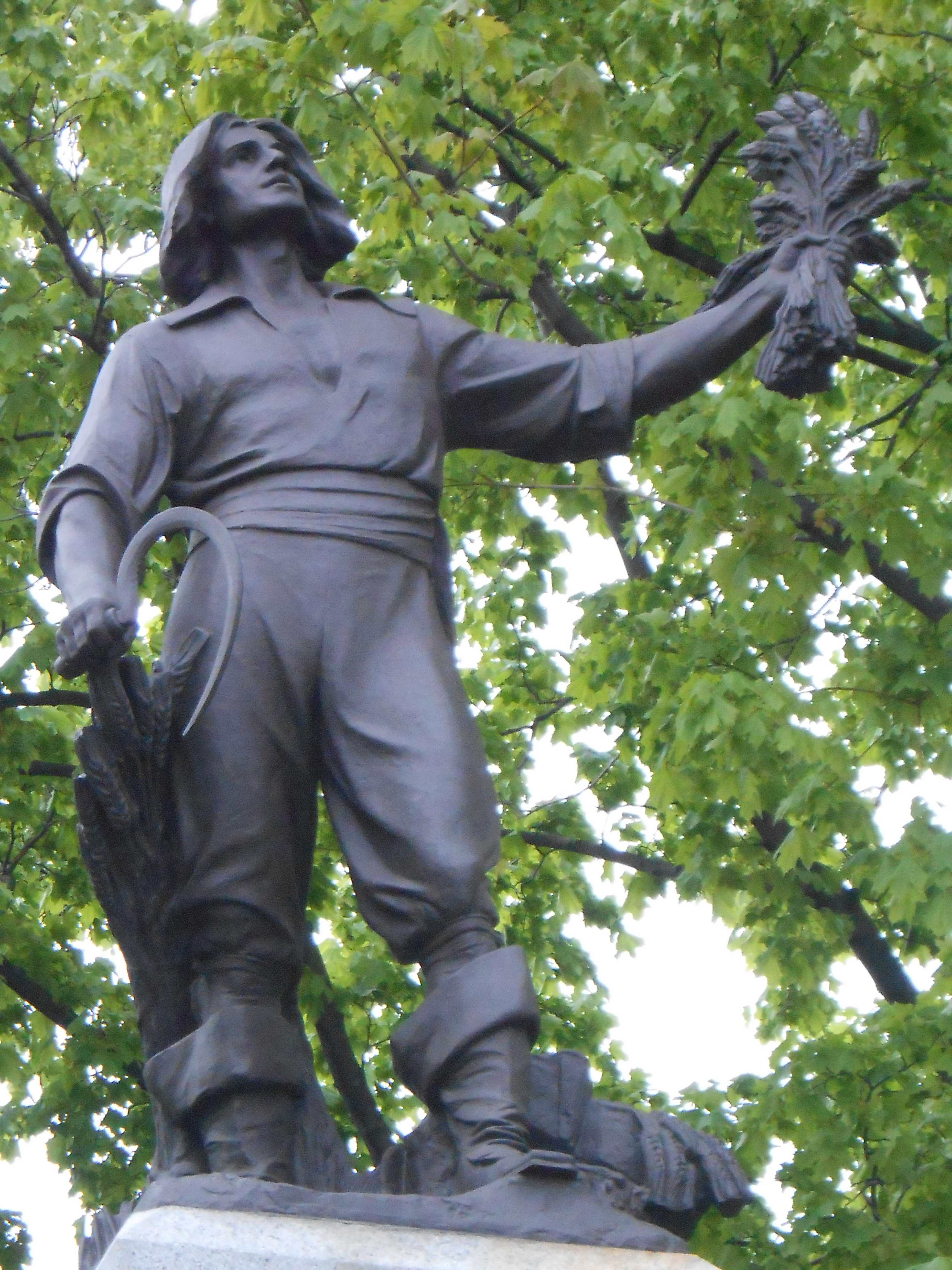 « Le monument Louis-Hébert (1575-1627) avait été initialement installé à la place de l'Hôtel de Ville, où il fut dévoilé le 3 septembre 1918, pour commémorer le troisième centenaire de l'arrivée en 1617 de cet apothicaire français qui est devenu le "premier colon canadien". Le monument fut démonté en 1971 et ultérieurement déménagé dans le parc Montmorency, au sommet de la côte de la Montagne. Les terres de Louis Hébert s'étendaient sur le site actuel de la Basilique Notre-Dame de Québec, du Séminaire, de l'Hôtel-Dieu, et des rues Hébert et Couillard. La statue en bronze de Louis Hébert au sommet du monument, et les personnages des hauts-reliefs en bronze reposant les socles, sont l'œuvre du sculpteur montréalais Alfred Laliberté. L'artiste a représenté Louis Hébert élevant une poignée d'épis de blé vers le ciel, offrant au Seigneur sa première récolte. Les personnages des hauts-reliefs sont : à droite, Marie Rollet, épouse Louis Hébert qui, assise au milieu de ses trois enfants, tient un livre et les instruit; à gauche, une statue du défricheur Guillaume Couillard, son gendre, appuyé sur une charrue. Le piédestal est orné de festons, d'écussons, et d'inscriptions incluant les noms des quarante-sept premiers colons de Québec. »